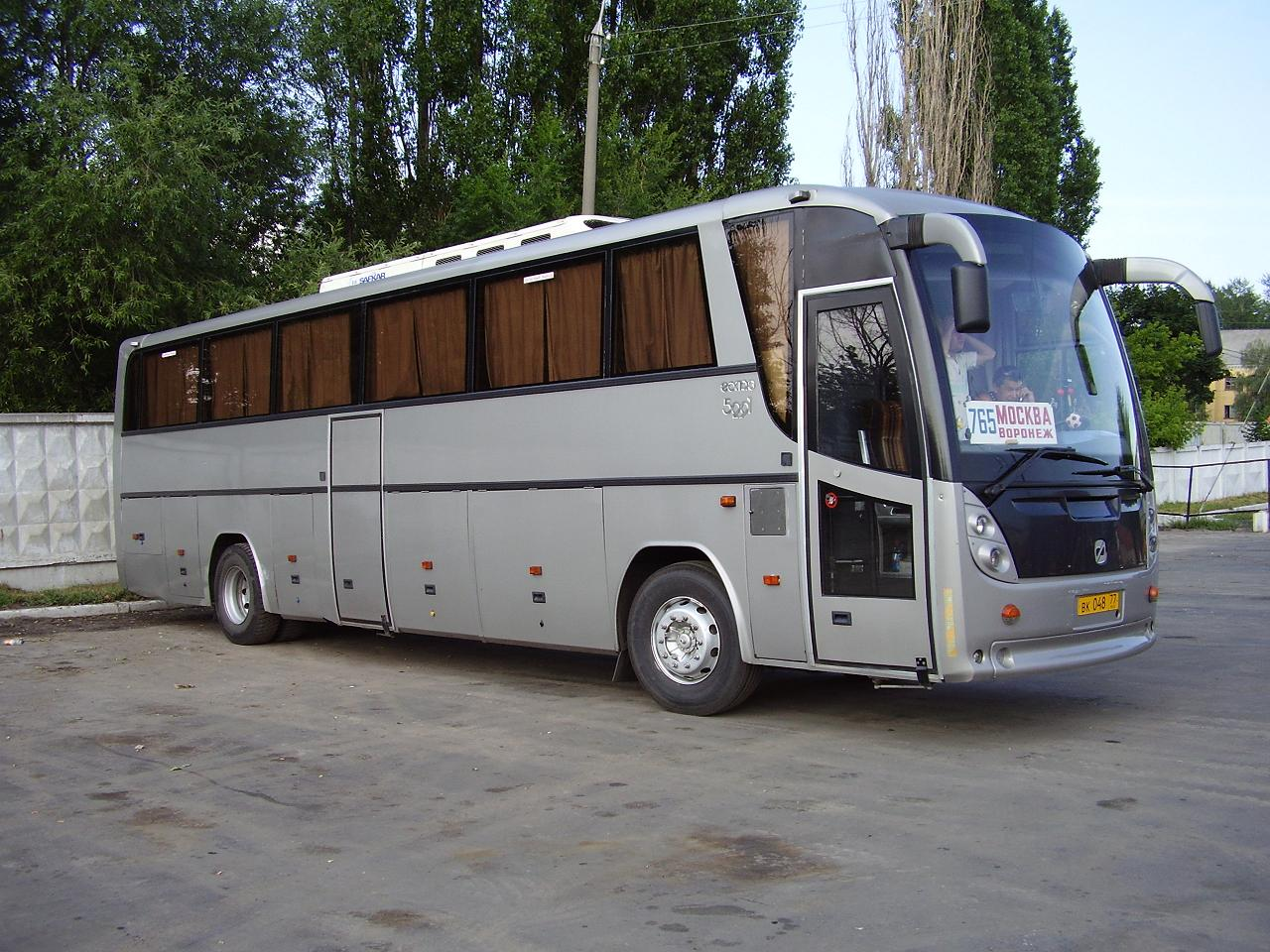 Автобус ГолАЗ-5291 на маршруте Воронеж--Москва